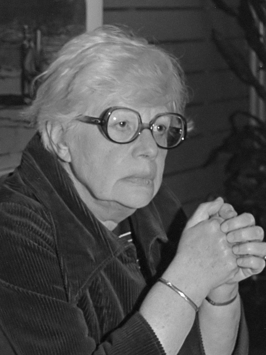 Persconferentie redaktie feministische maandblad "Opzij". Paula Wassen (links) en Wim Hora Adema (rechts) van "Opzij" tijdens de persconferentie 17 september 1981